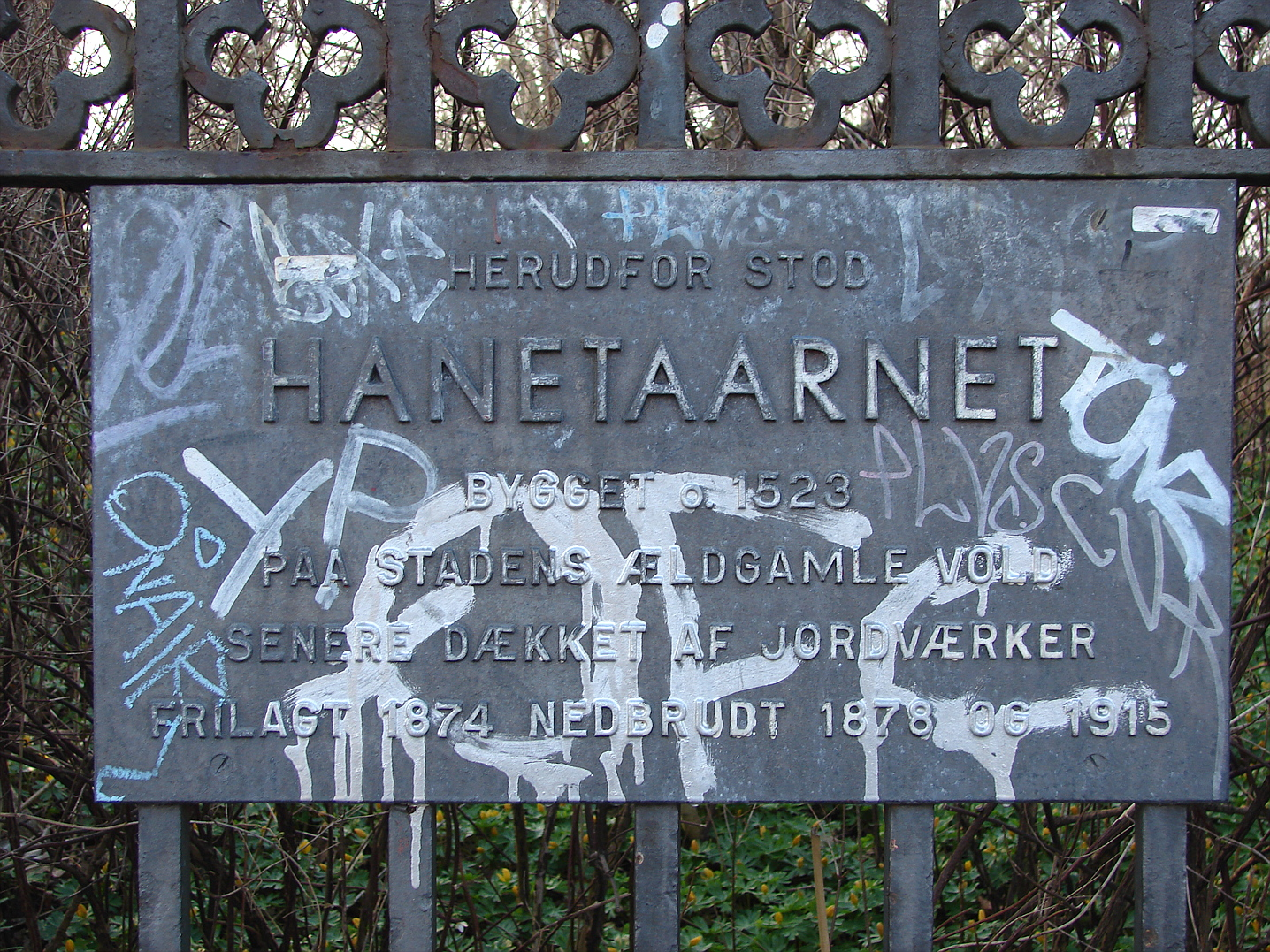 Mindeplade over Hanetaarnet, Nørre Voldgade, København